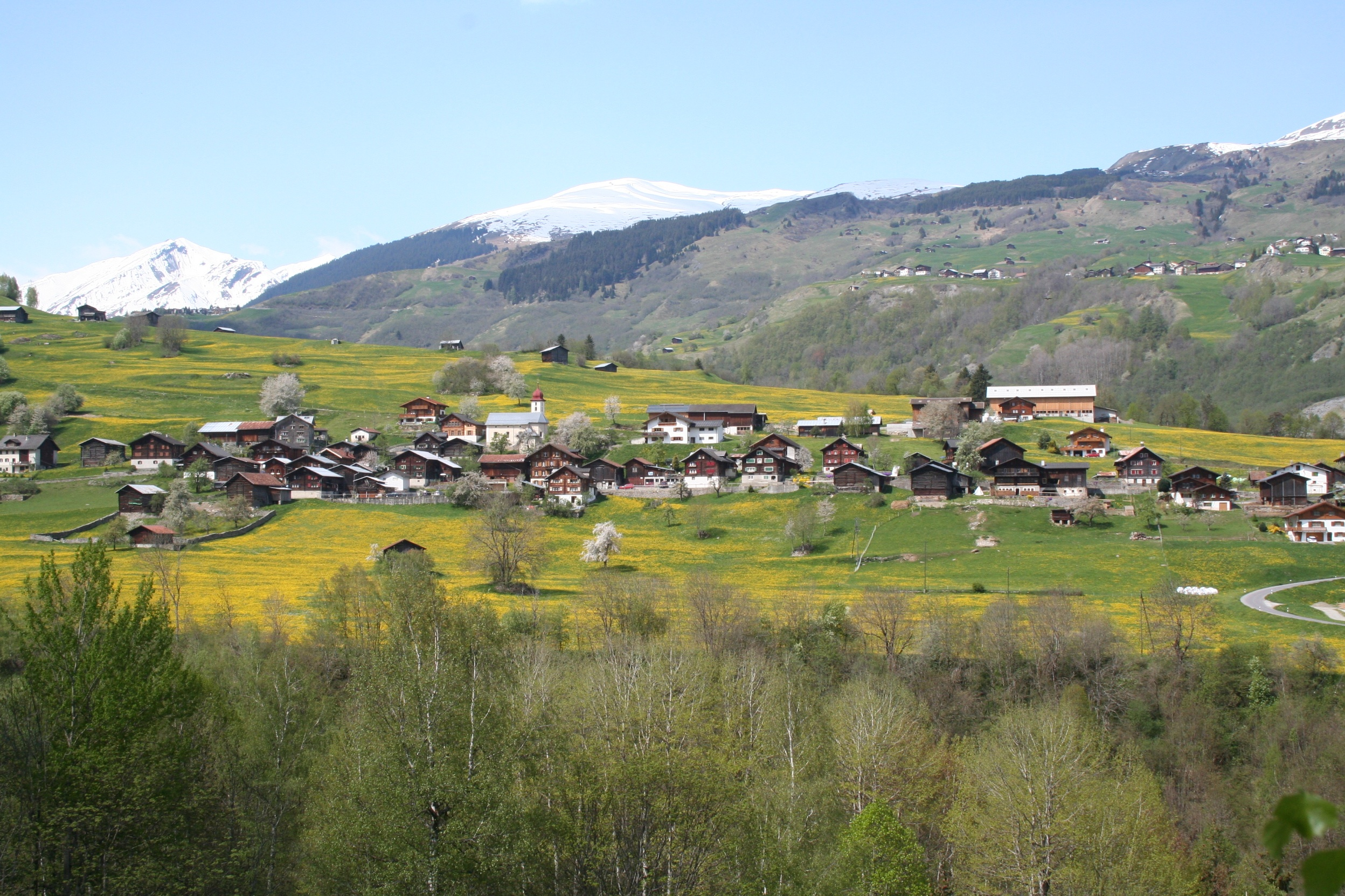 Surcasti